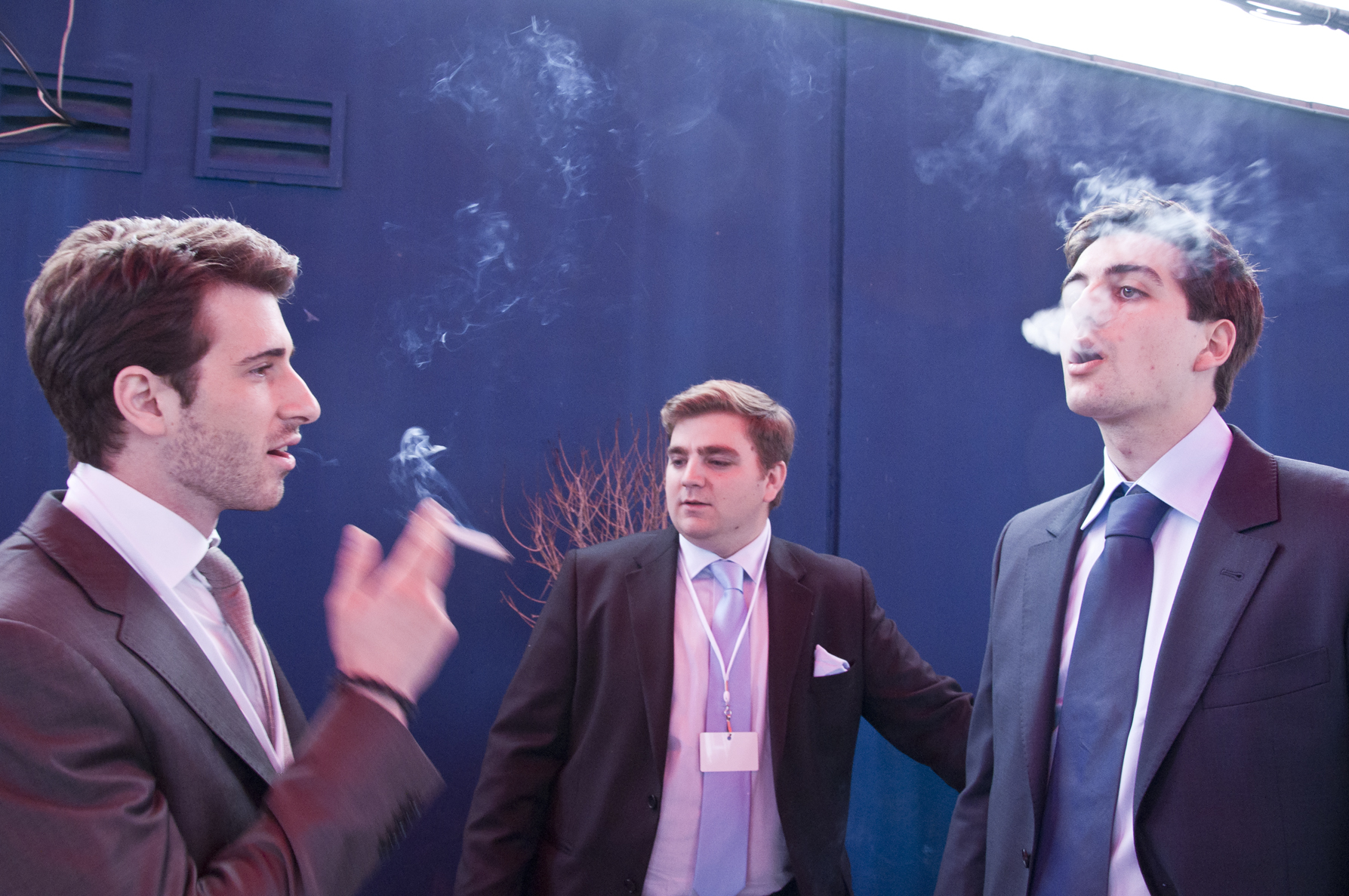 Julien Rochedy, Maxime Ango-Bonnefon et Paul-Alexandre Martin (Les Jeunes avec Marine) le 22 avril 2012, avant les premiers résultats de la présidentielle.